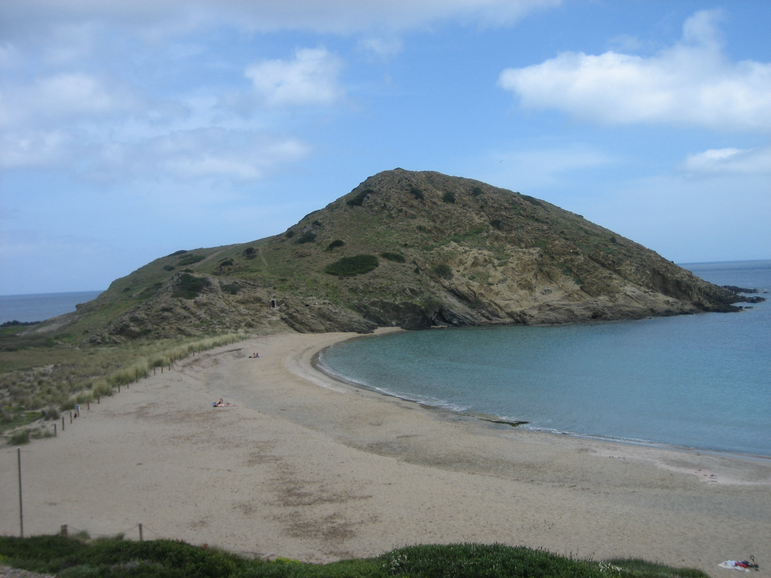 Arenal de sa Mesquida (Maó) This is a a photo of a beach in the Balearic Islands, Spain, with id: PL-IB-70102